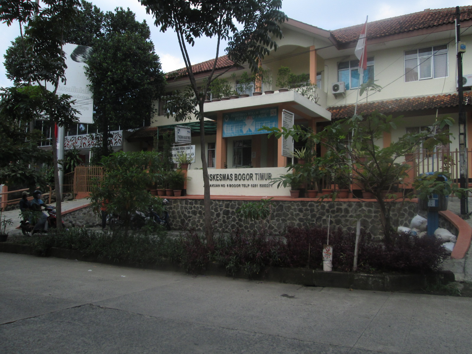 Puskesmas Bogor Timur, Bogor.